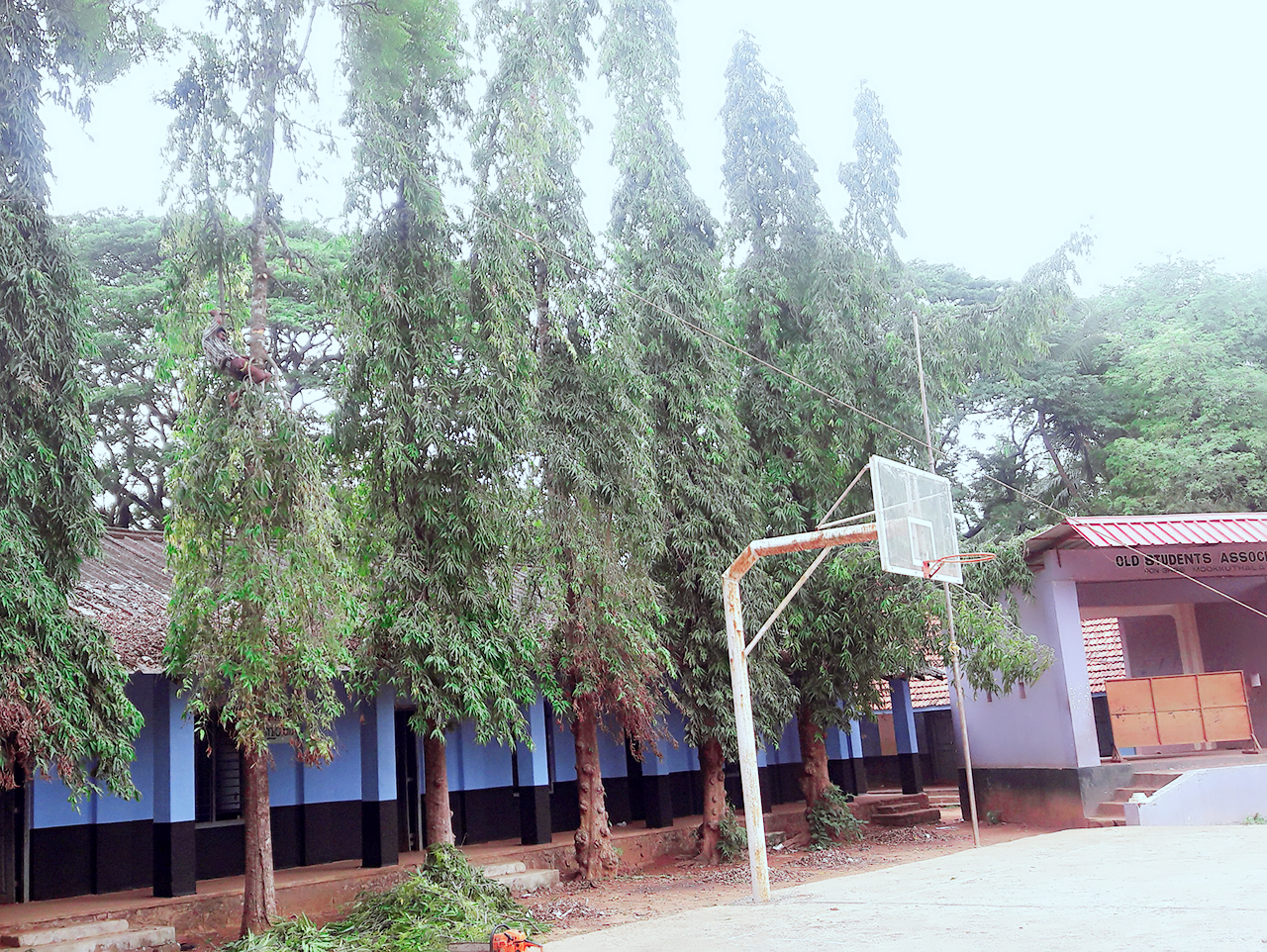 അരണമരം ശാസ്ത്രീയനാമം: Polyalthia longifolia കുടുംബം Annonaceae.